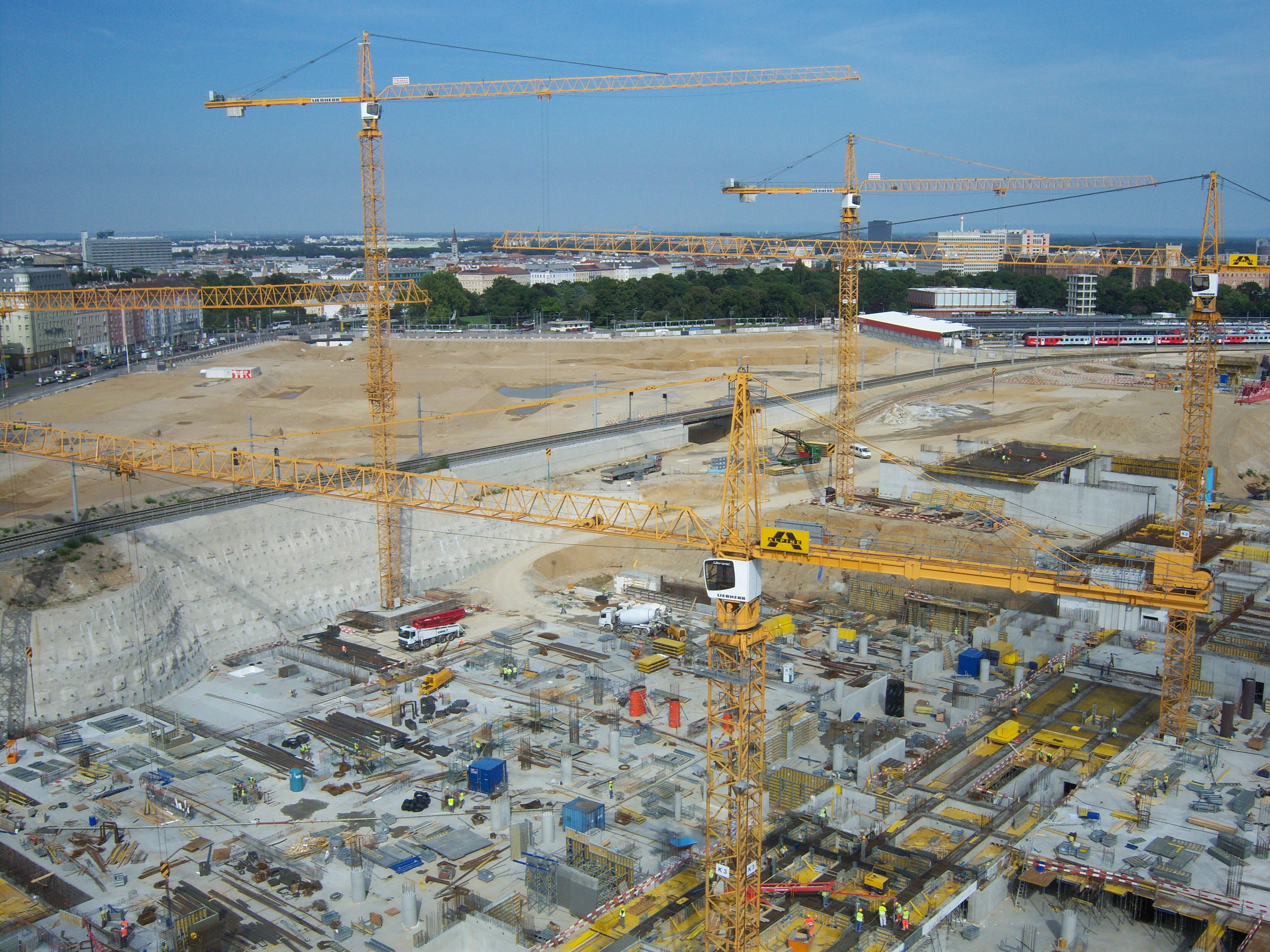 Blick von der Aussichtsplatforum "Bahnorama" auf den Bereich um die Baustelle des Wiener Hauptbahnhof